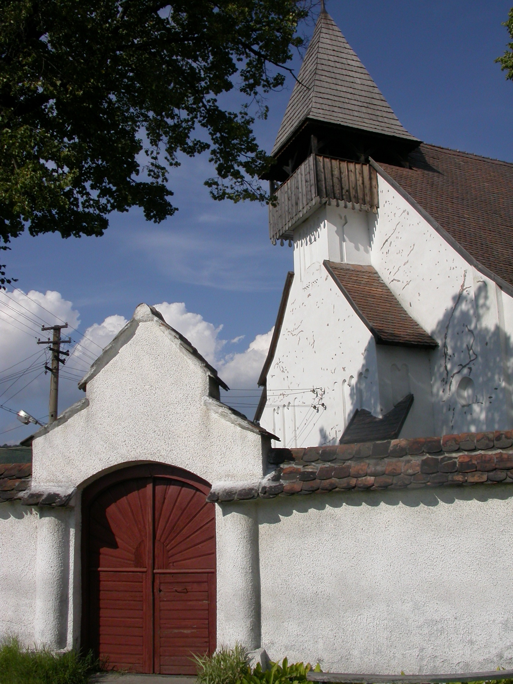 Ansamblul bisericii evanghelice S. P. sec. XIII - XVIII